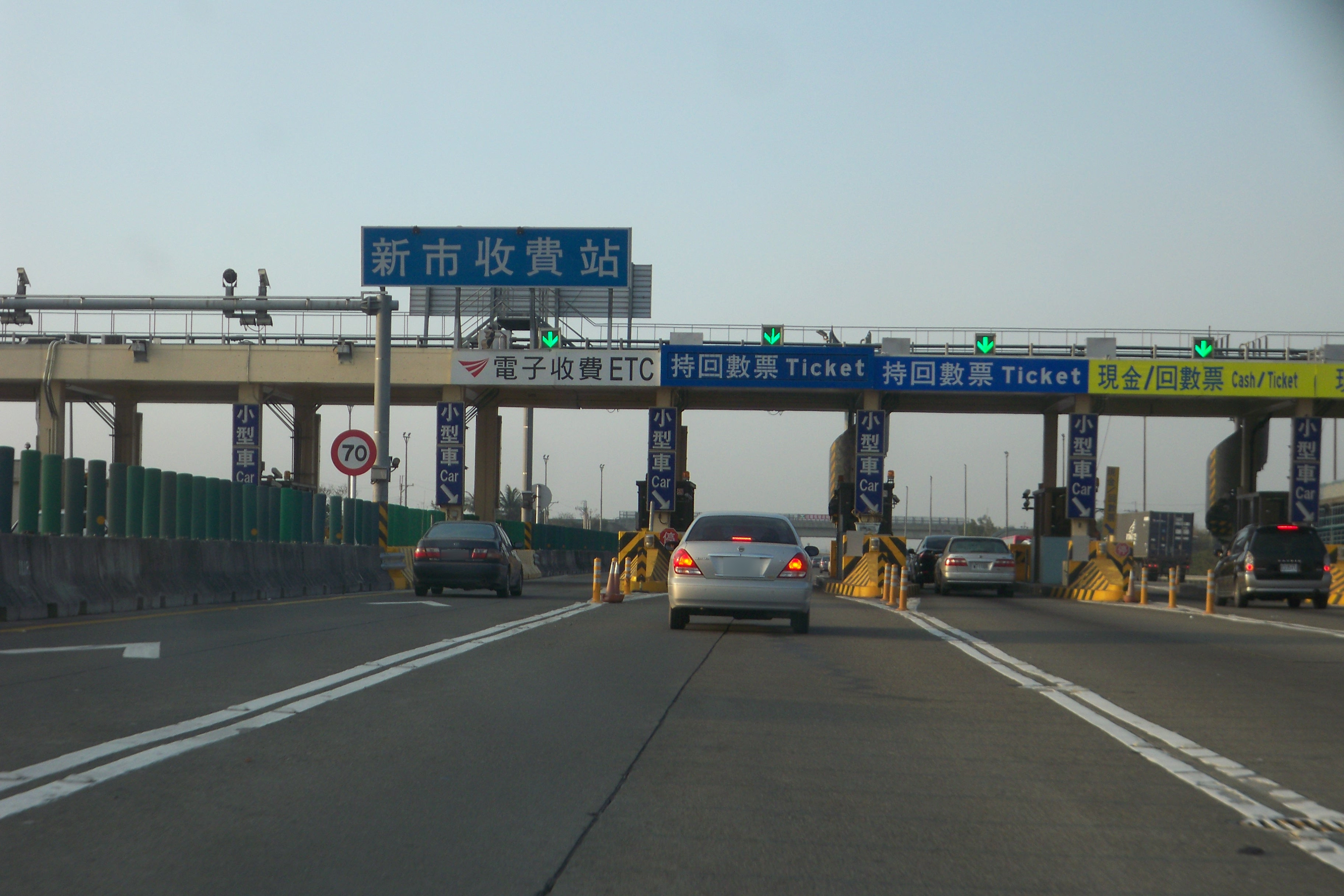 台南市 新市收費站